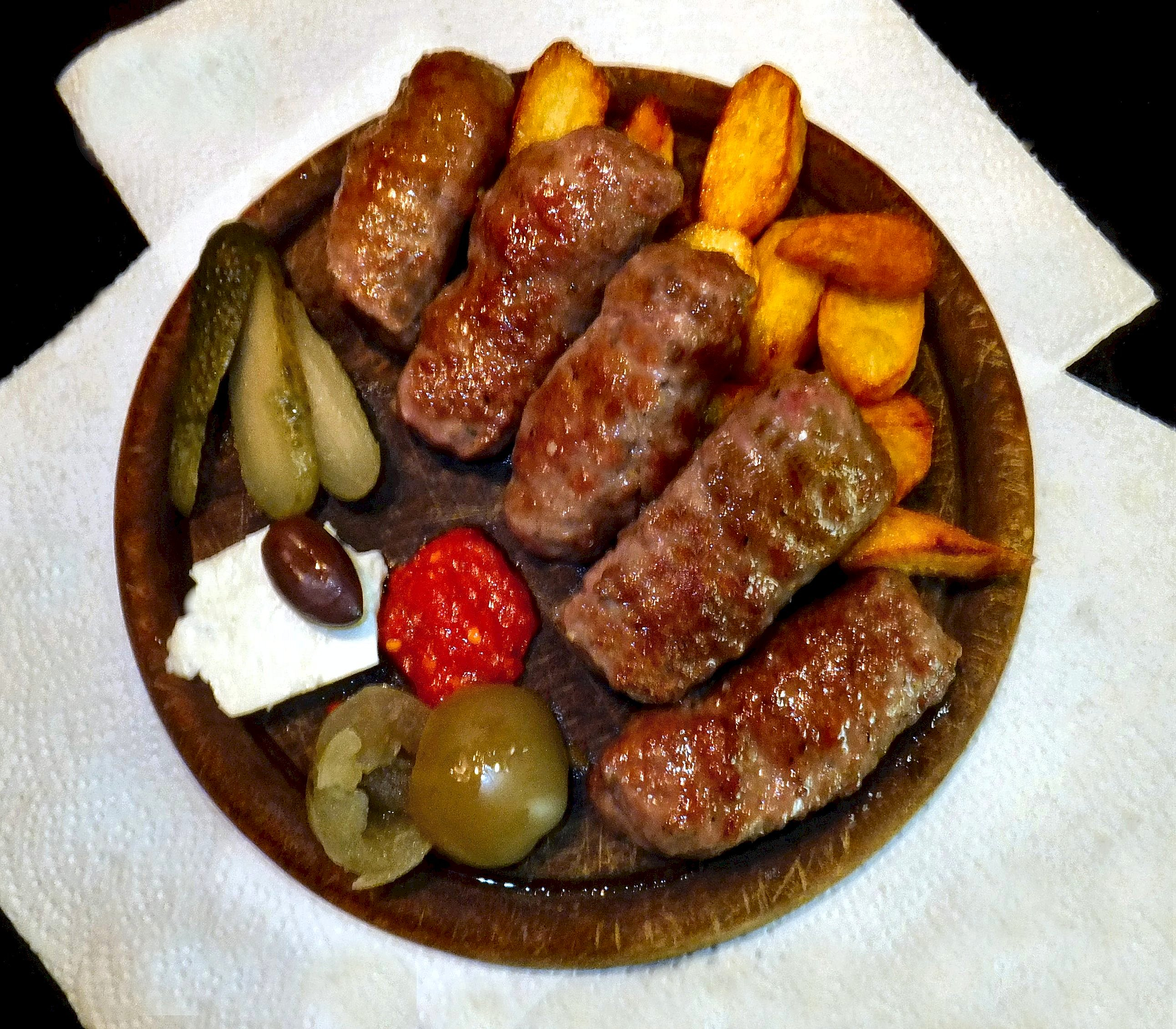 Mititei (Mici) mit Beilagen